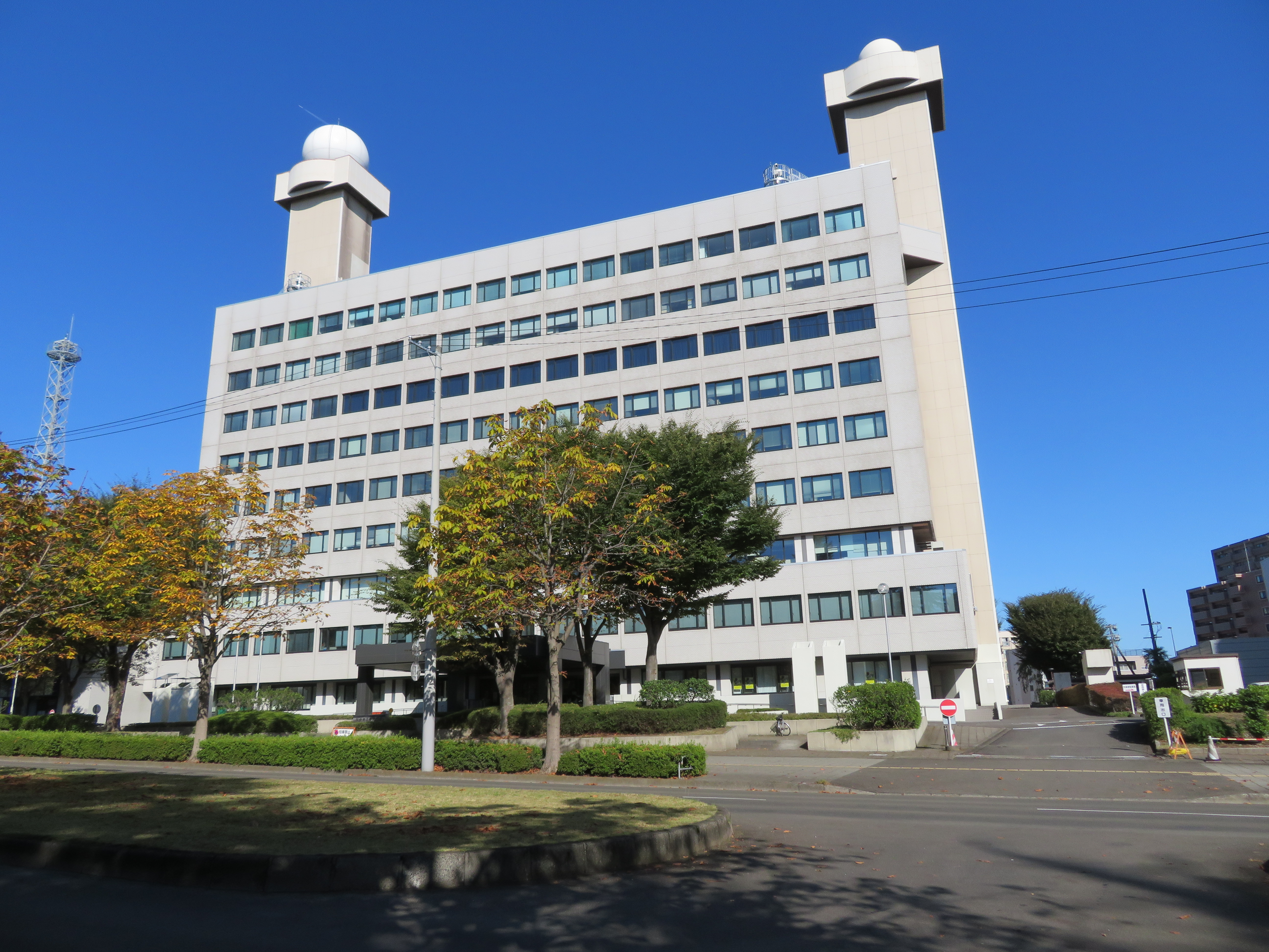 仙台市宮城野区に所在する仙台第3合同庁舎 Canon PowerShot SX720 HS